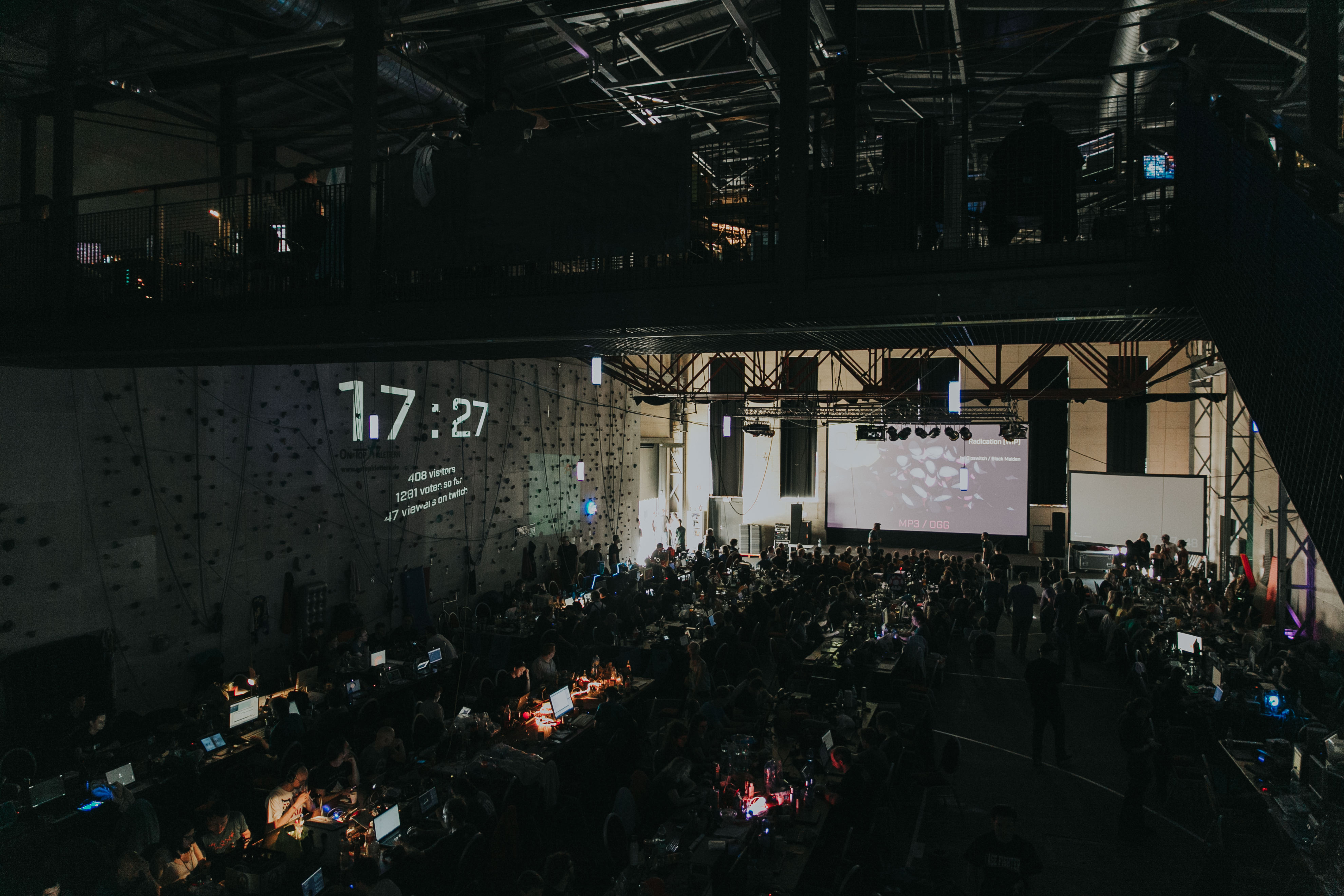 Seit 2009 findet die Evoke in der "Abenteuerhalle" in Köln-Kalk statt